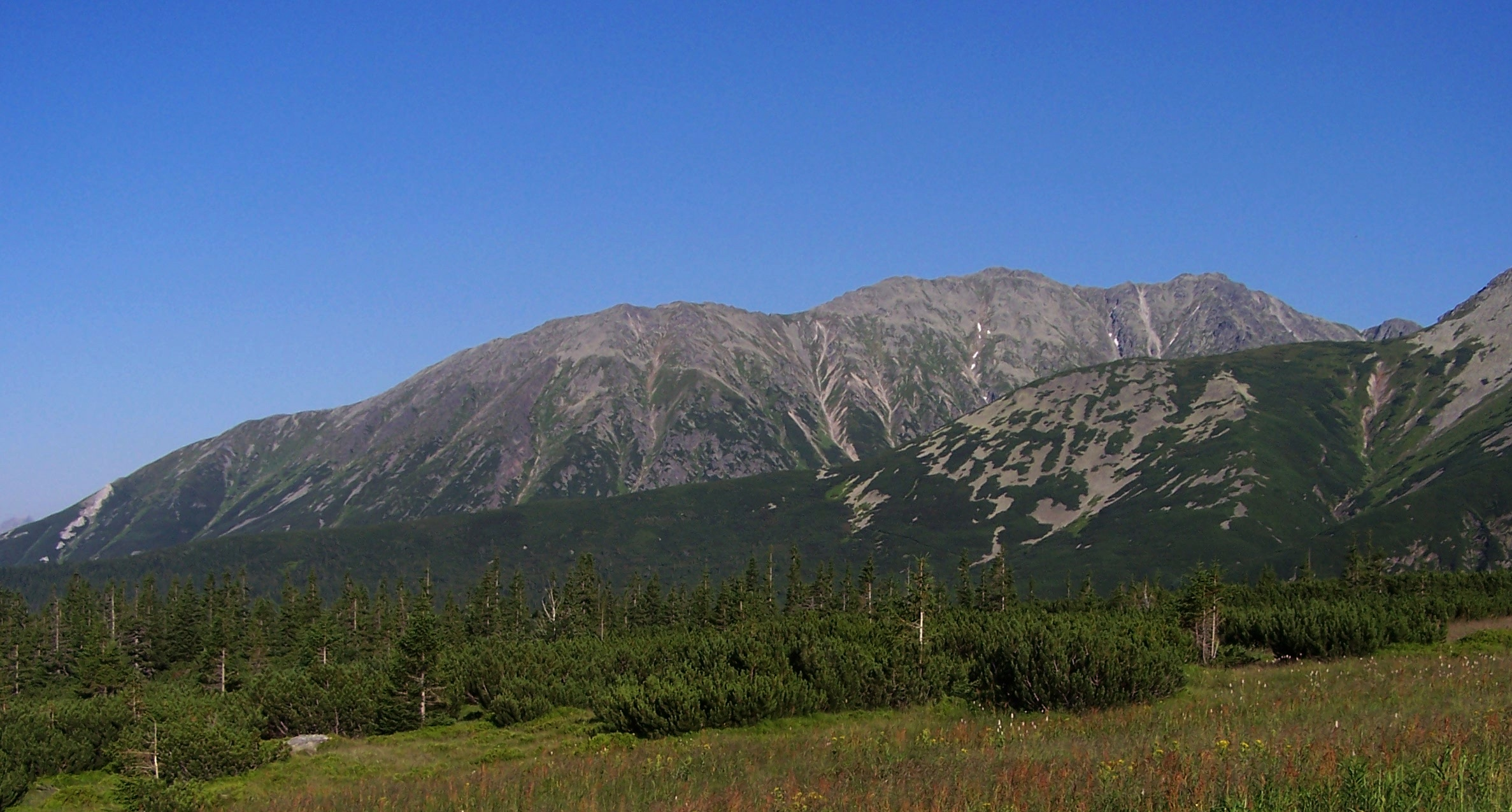 Koszysta (Tatra Mountains)